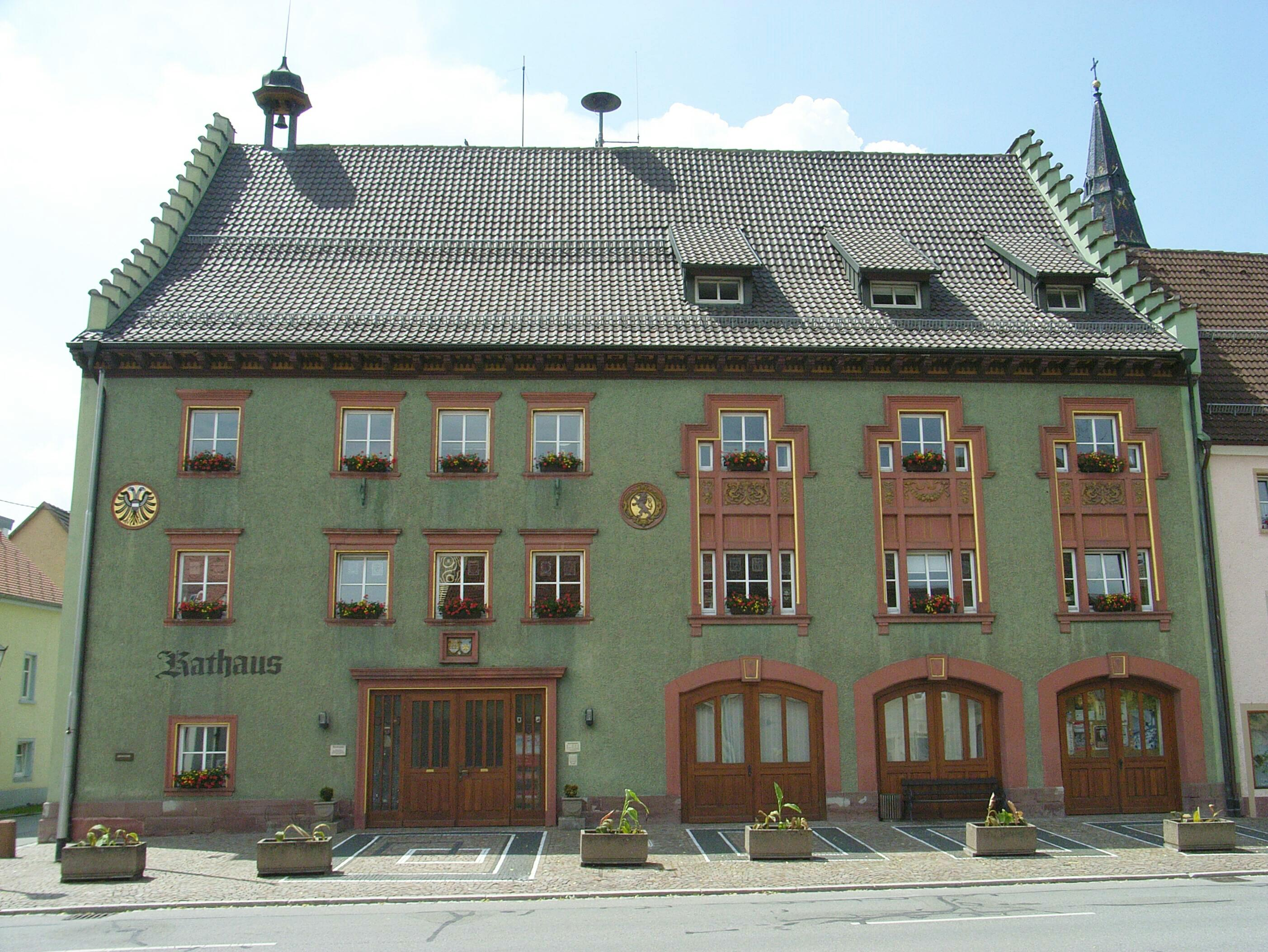 Dieses Bild zeigt das Rathaus von Bräunlingen.